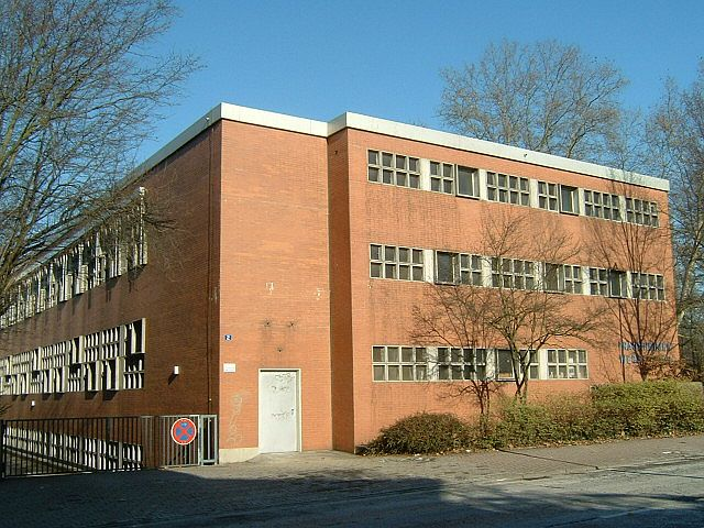 ehem. Praunheimer Werkstätten, eine Behindertenwerkstatt in Frankfurt- Praunheim, direkt gelegen an der Praunheimer Brücke, jetzt Flüchtlingswohnheim "AP2". Selbst fotografiert am 29.1.06